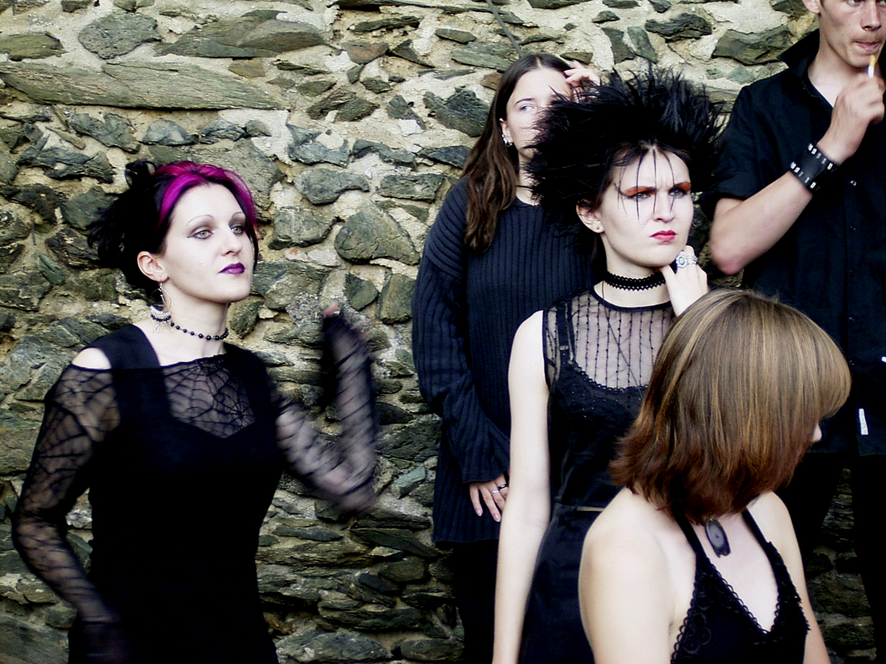 Publiczność na festiwalu muzyki gotyckiej Castle Party